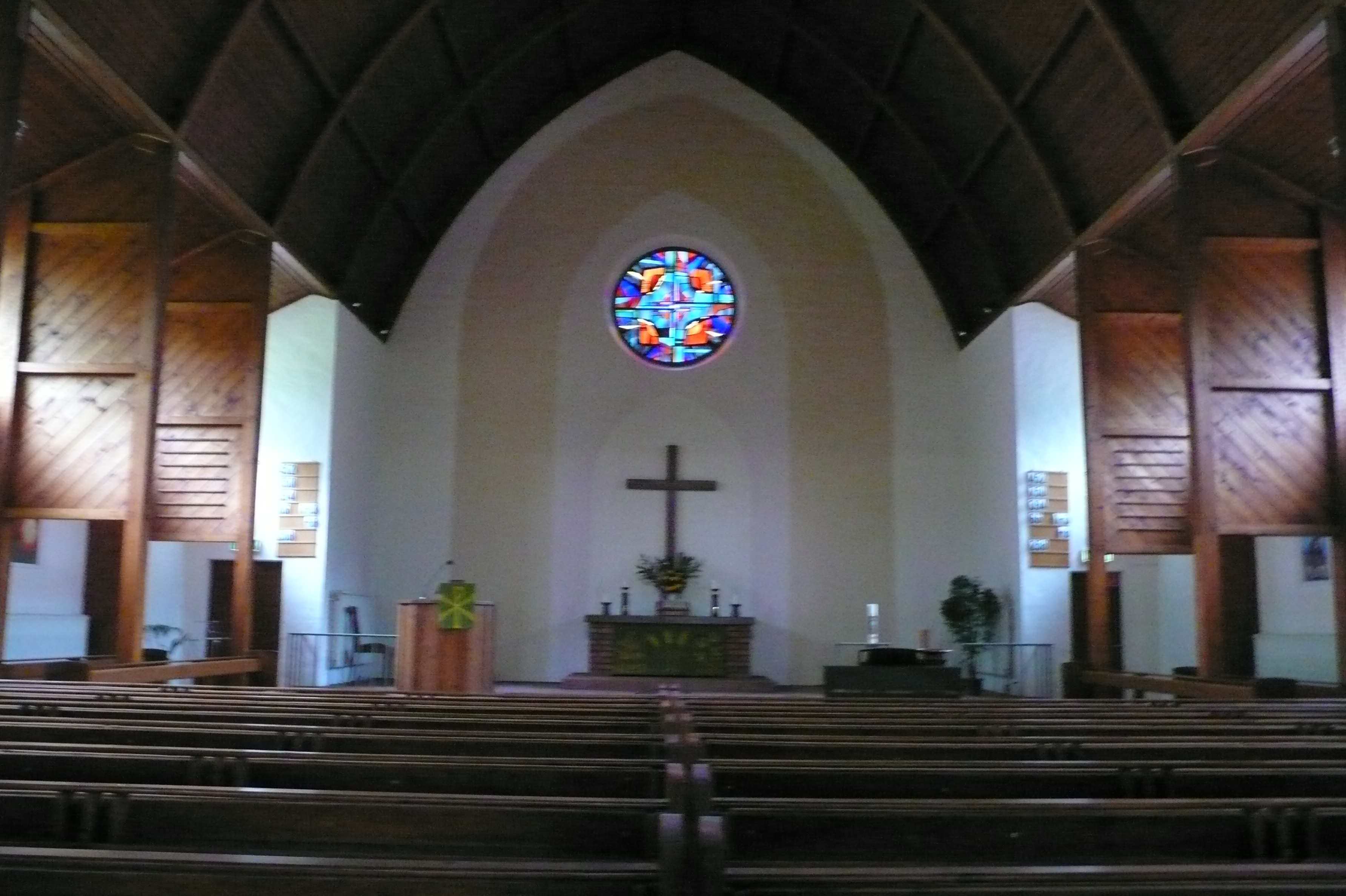 Bethanienkirche in Frankfurt am Main, eine der mehr als 40 Notkirchen des Architekten Otto Bartning